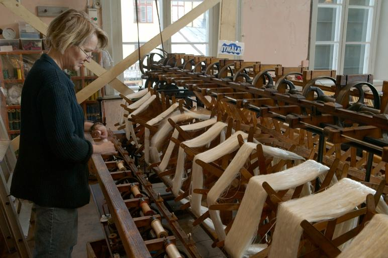 Bobinmaskin. Silkeshärvan dras upp på bobiner (stora trådrullar). Motiv: Almgrens sidenväveri Kategori: Väveri, Museum Bobinmaskin. Silkeshärvan dras upp på bobiner (stora trådrullar).